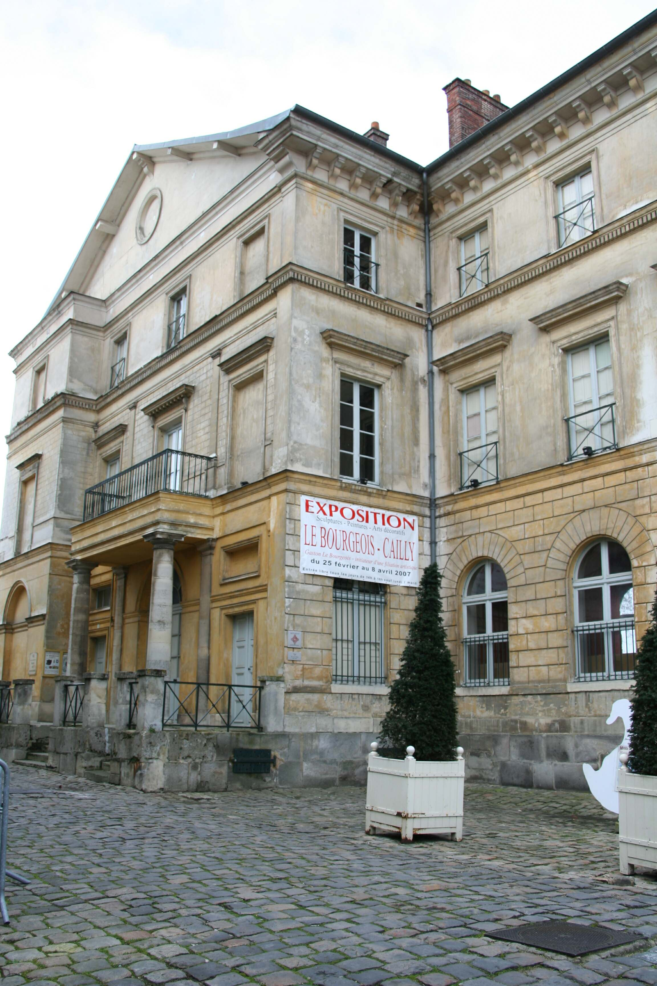 Palais du roi de Rome à Rambouillet - Yvelines (France)